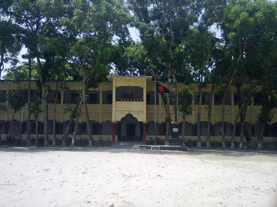 বিদ্যালয়ের সম্মুখভাগের চিত্র